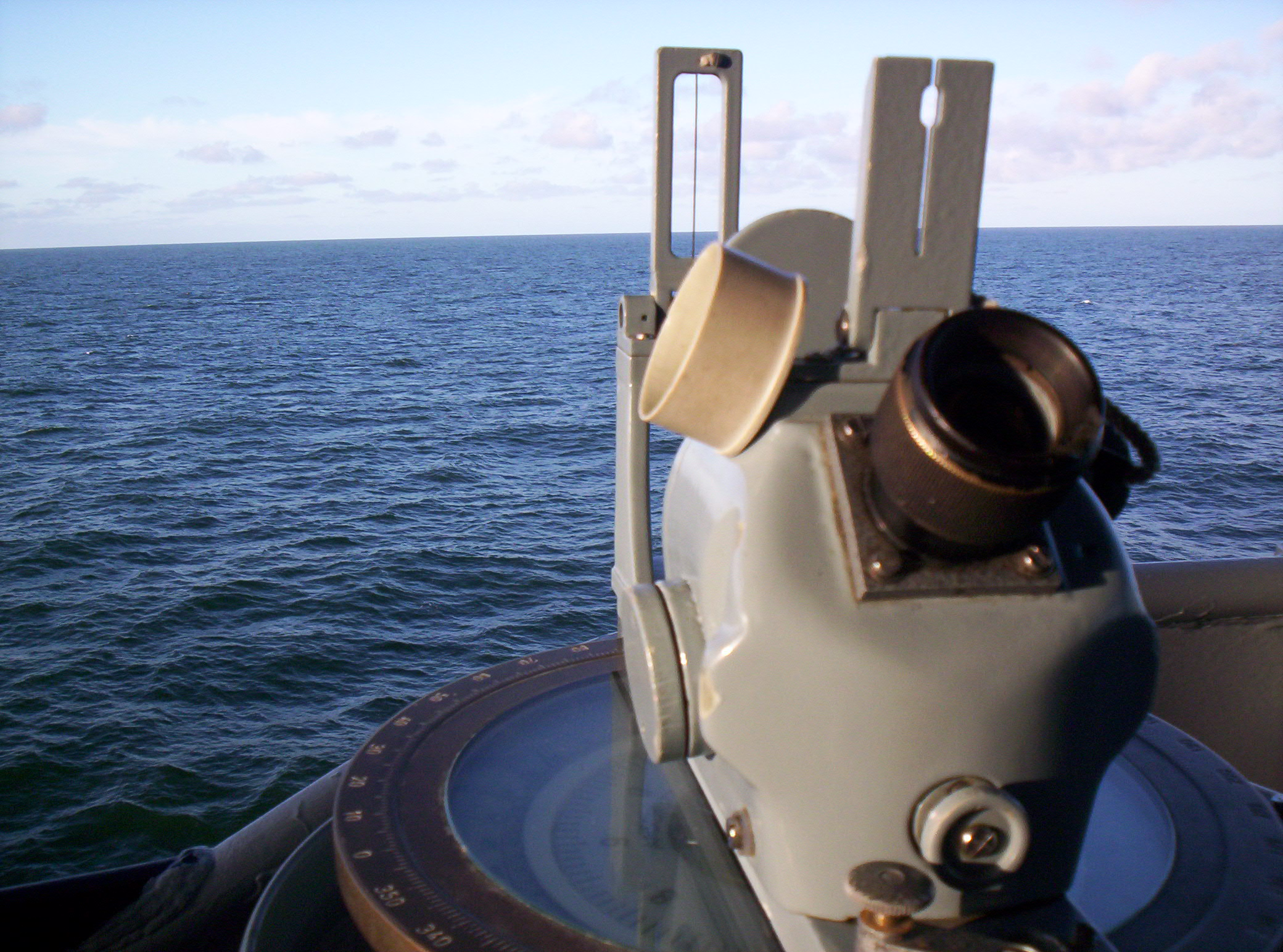 Rumbo - Rou 04 Buque de Apoyo, Comando y Control General Artigas